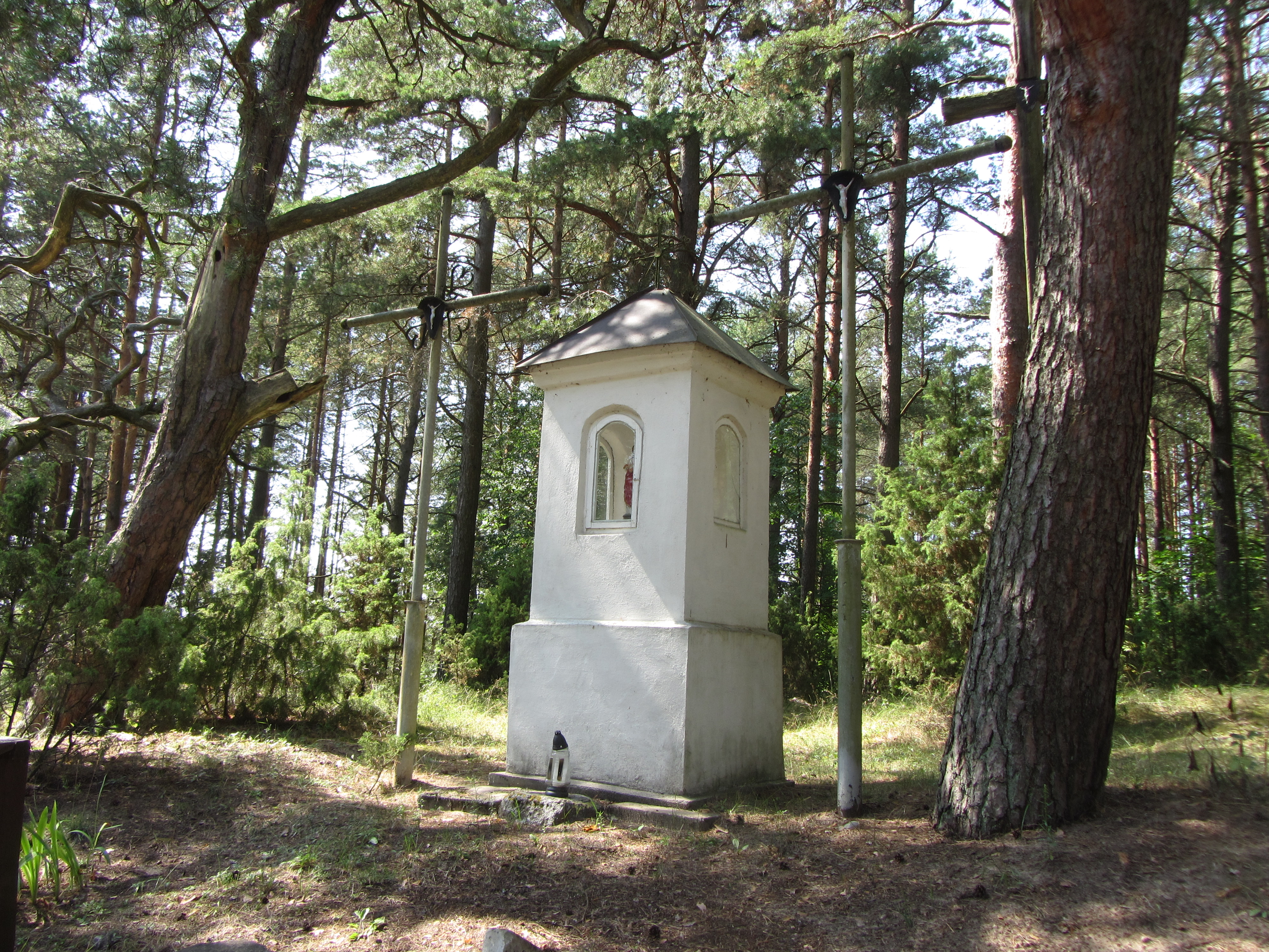 Švendubrė 66444, Lithuania